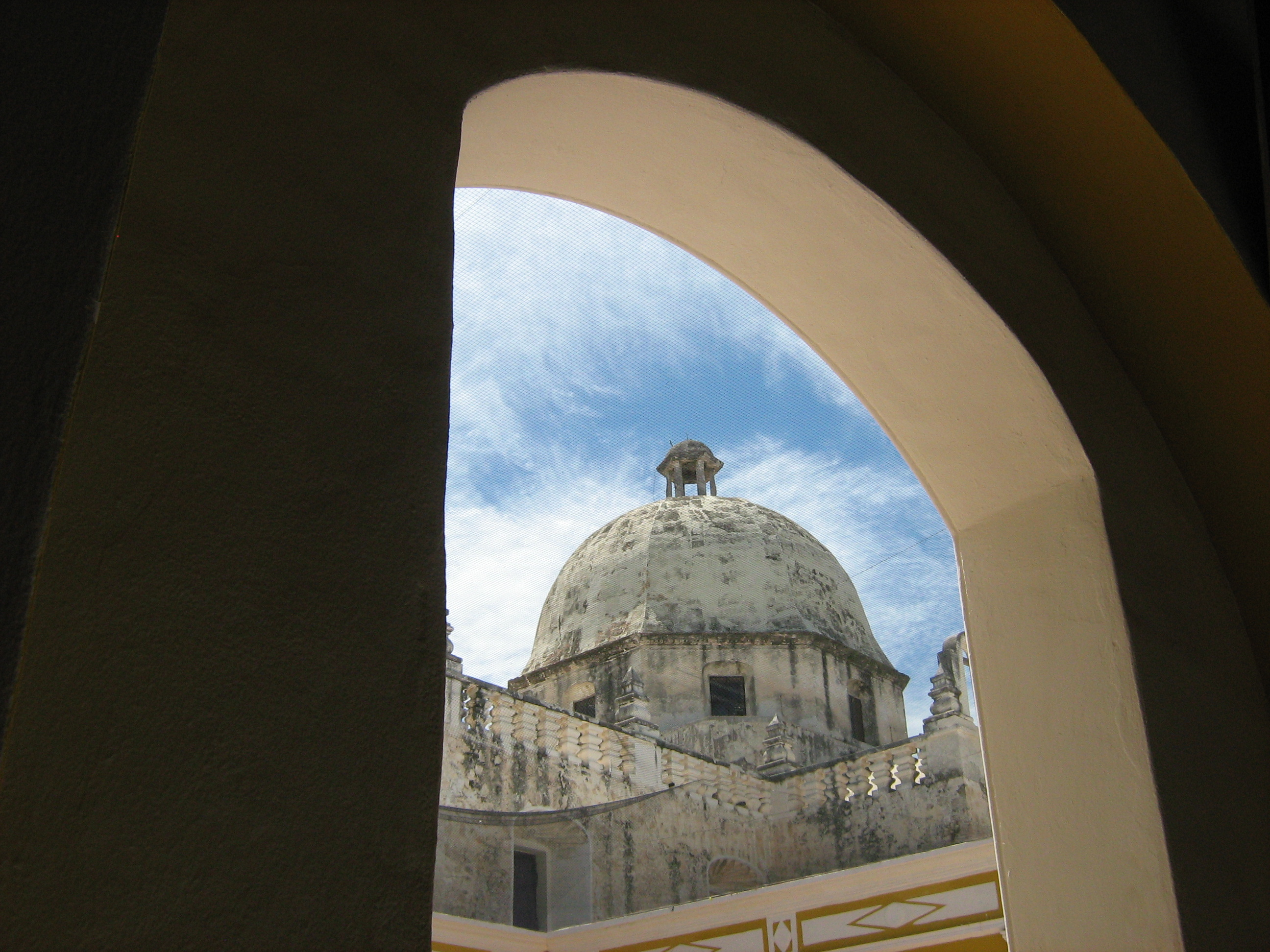 Cúpula del Ex Templo de San José, en Campeche, México; vista desde el Instituto Campechano. Fue terminada en 1756 por franciscanos.